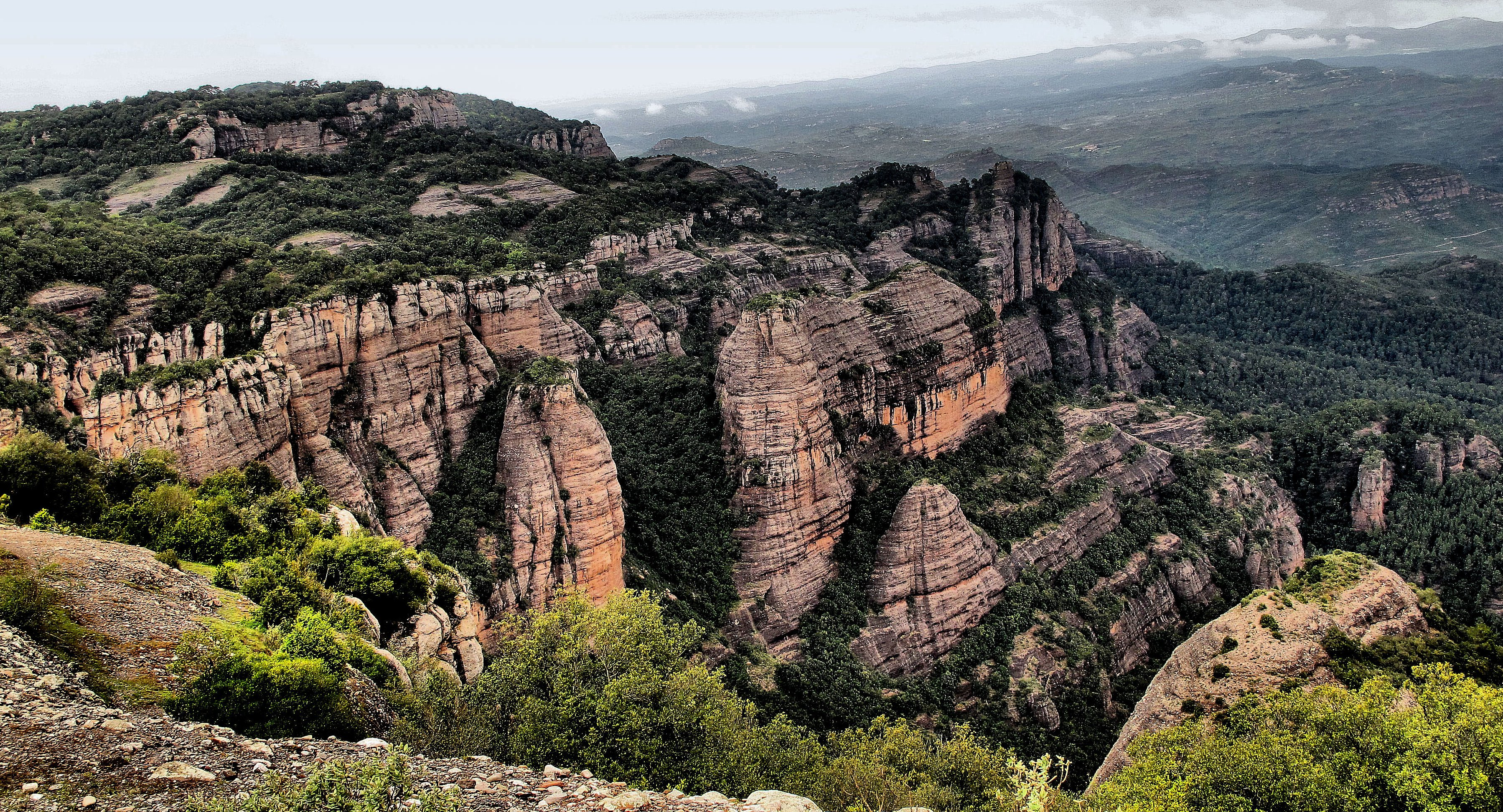 El món del conglomerat, de les cingleres i de les roques de formes singulars. This is a a photo of a natural area in Catalonia, Spain, with id: ES510002